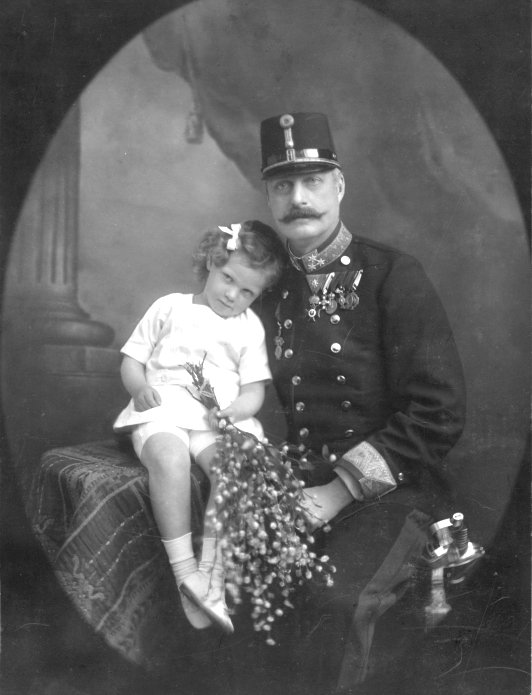 Erzherzog Leopold Salvator von Österreich-Toskana mit seinem jüngsten Sohn, Karl Pius. Silbergelatineabzug.